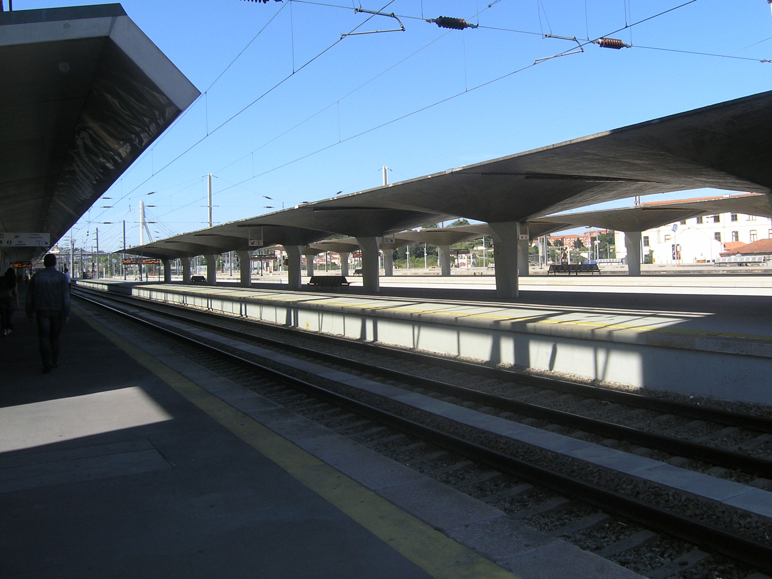 Estaçao de Campanha